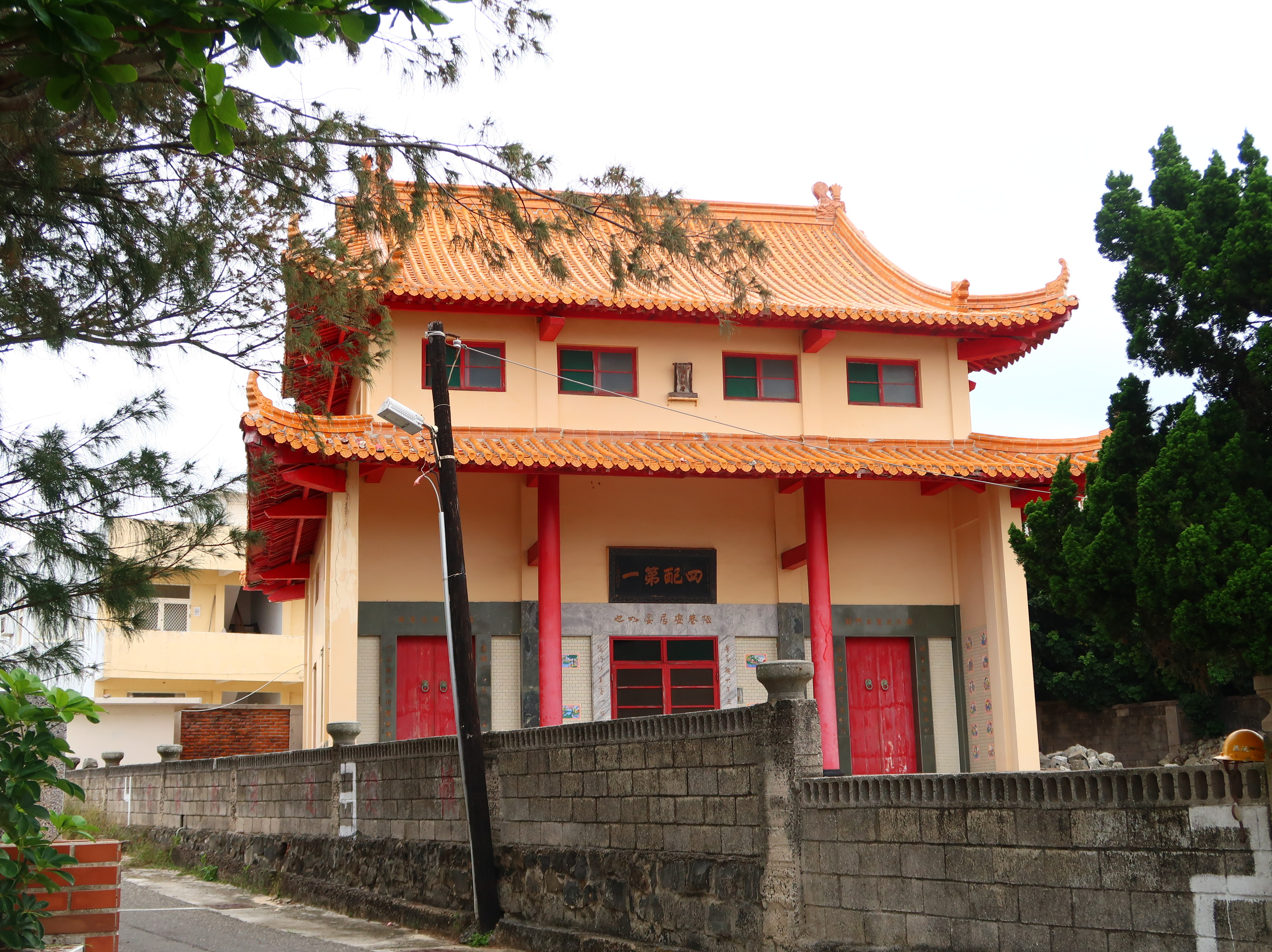 台灣澎湖西嶼鄉，小池角顏氏宗祠（池東村74號）